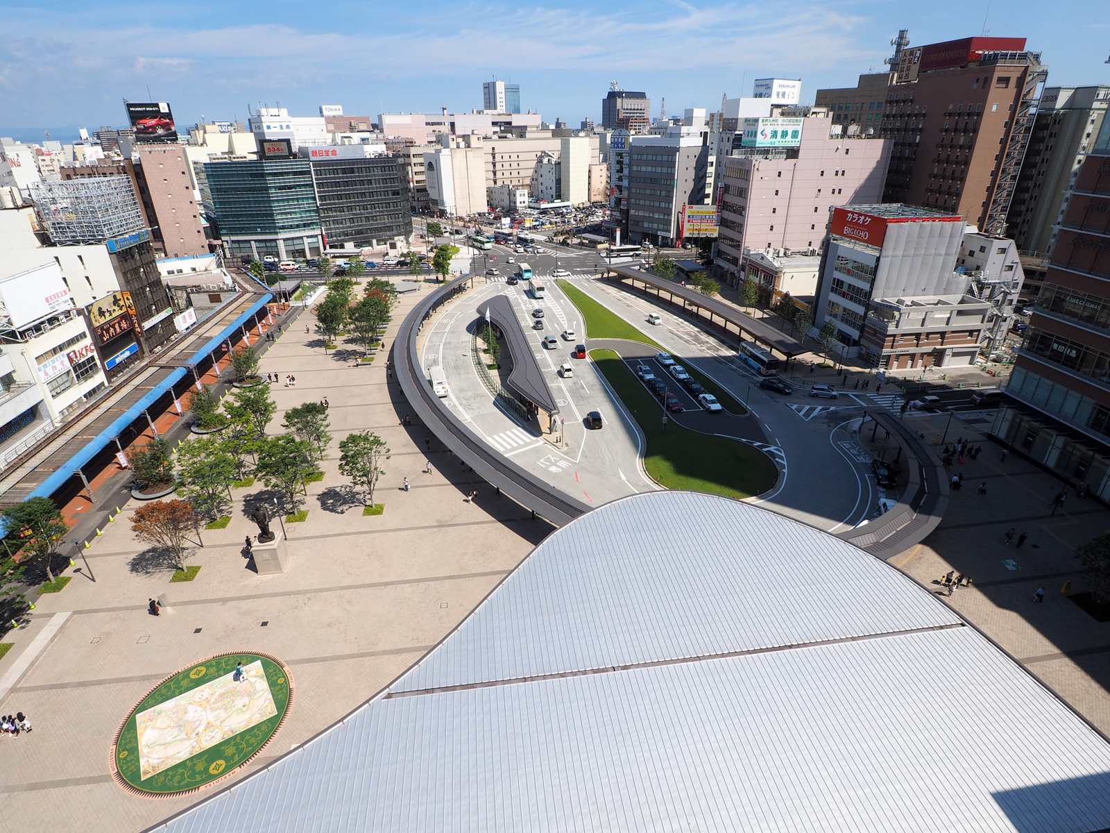 JR大分駅府内中央口広場（大分県大分市）